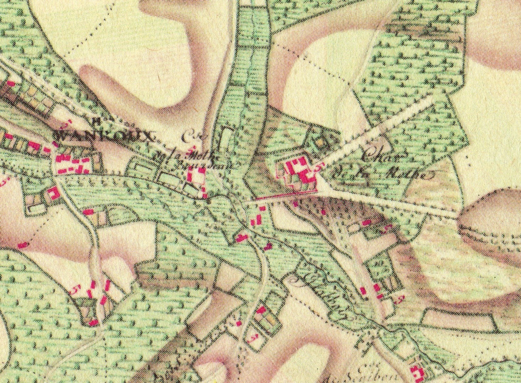 Carte des Pays Bas autrichiens (Comte de Ferraris) levée entre 1771 et 1778. Bousval-Noirhat en Brabant Wallon (Belgique). Détail sur le château de la Motte.